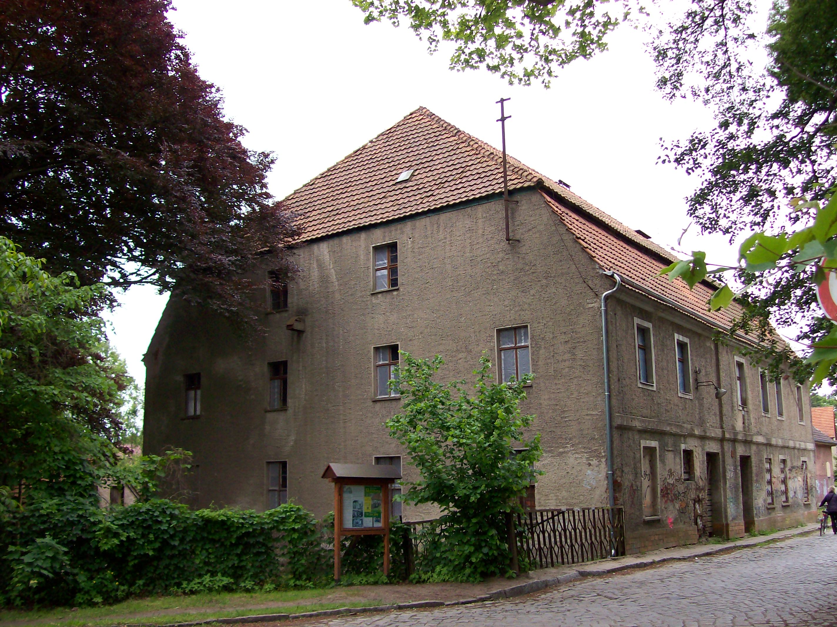 Mönchmühle in Schildow